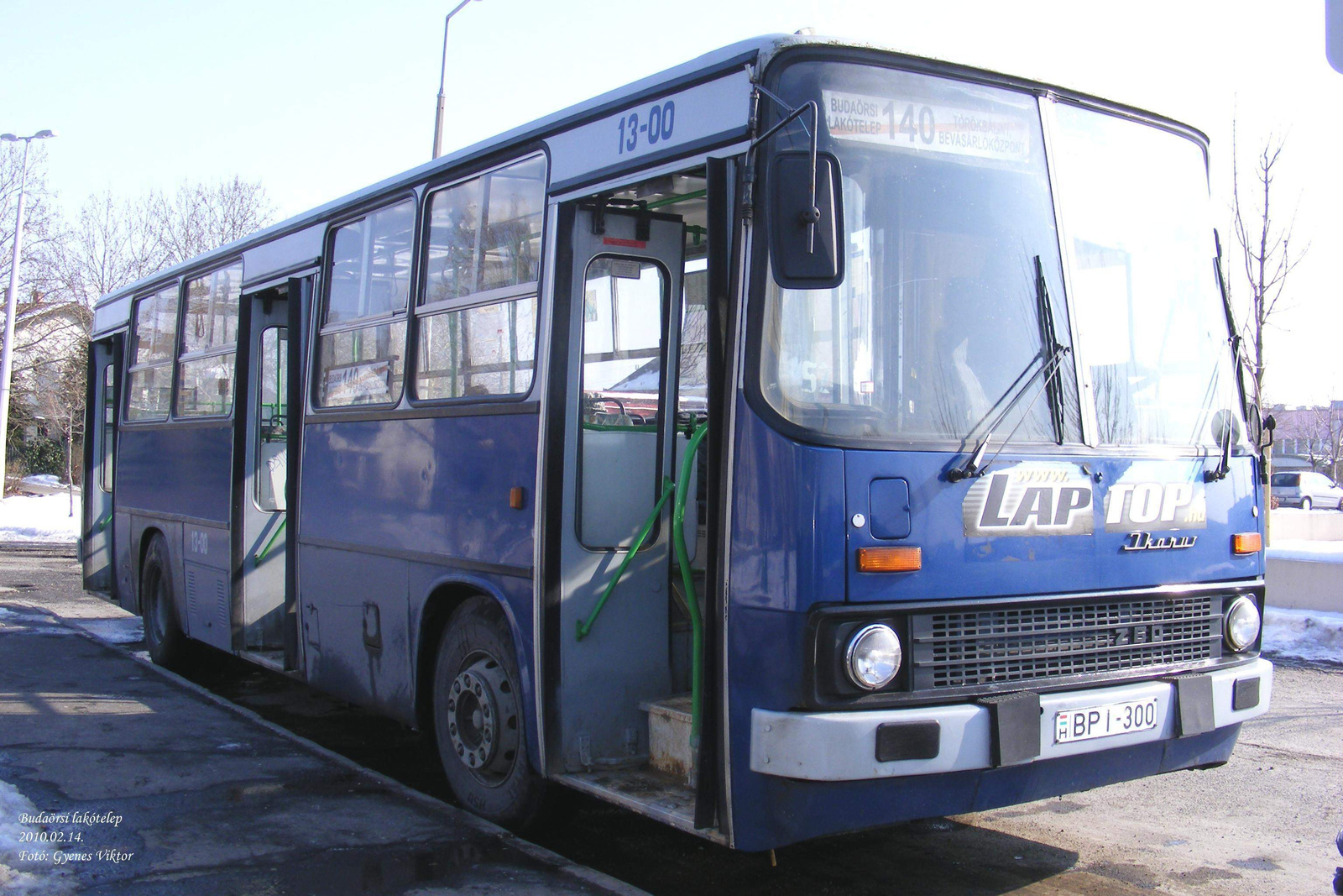 140-es jelzésű Ikarus 260-as busz Budaörsön